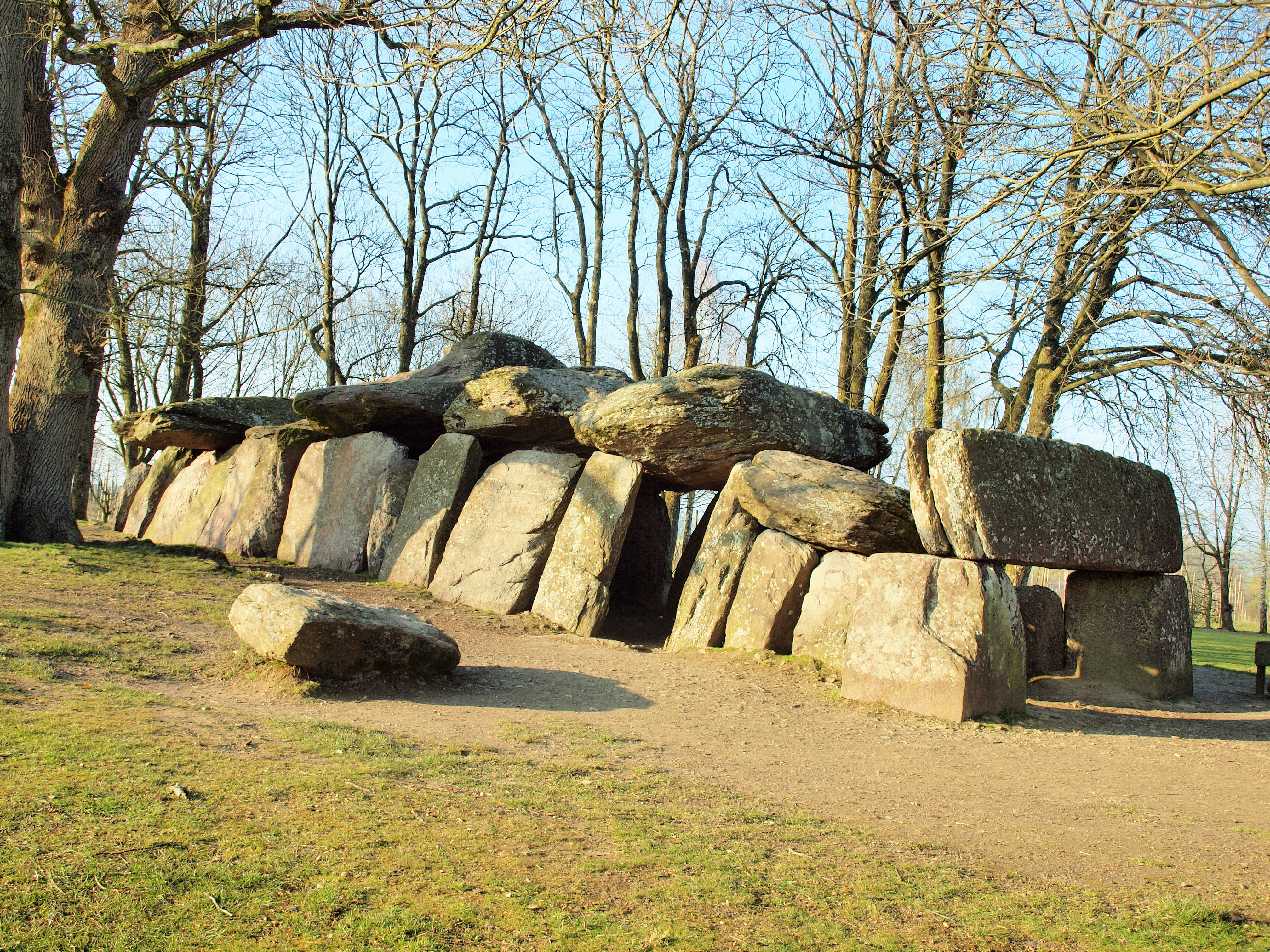 Dolmen de la Roche-aux-Fées à Essé (Ille-et-Vilaine, France)